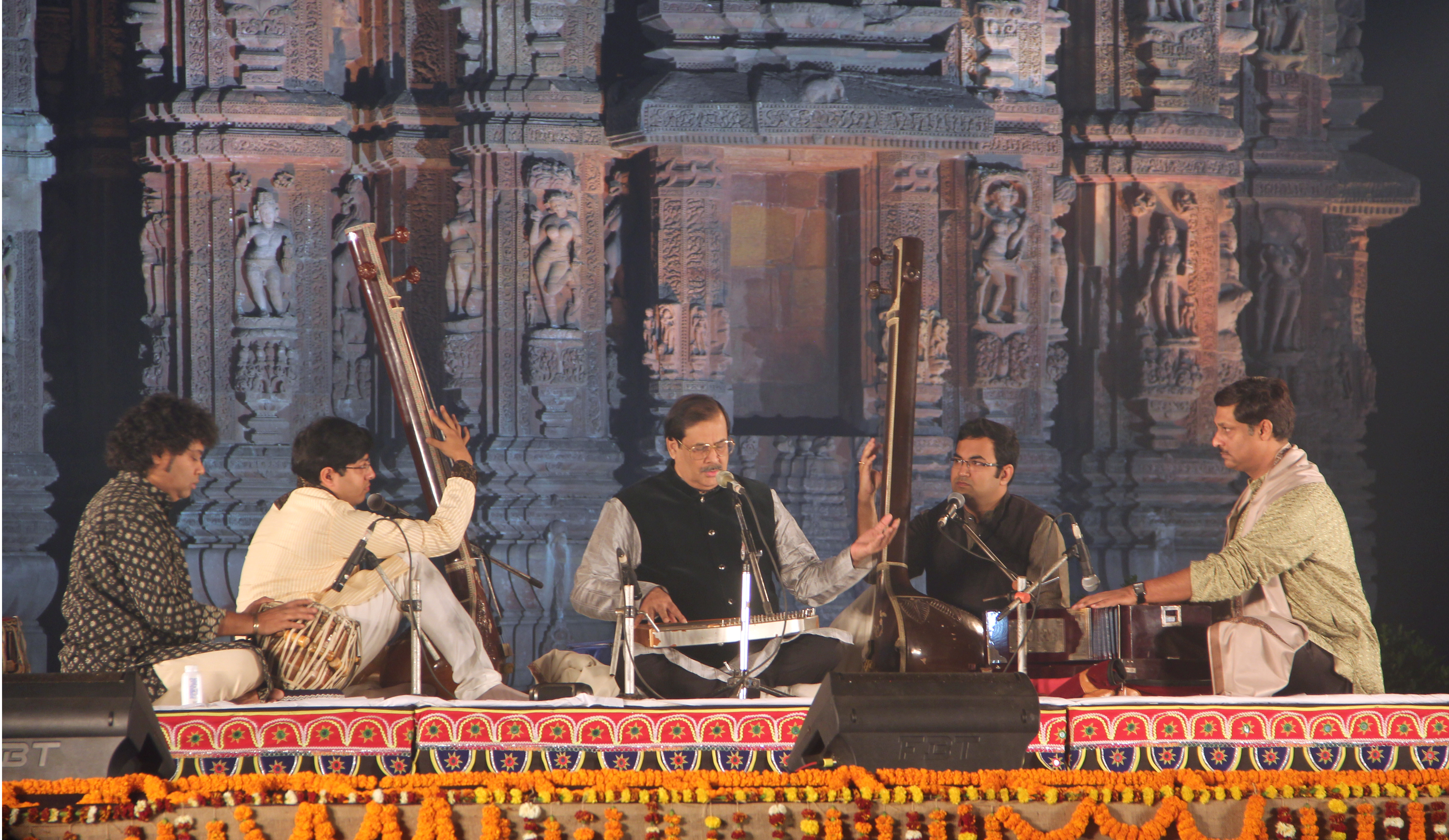 ଓଡ଼ିଆ: Pt. Ajoy Chakrabarty Performing at Rajarani Music Festival, Rajarani Temple, Bhubaneswar, Odisha